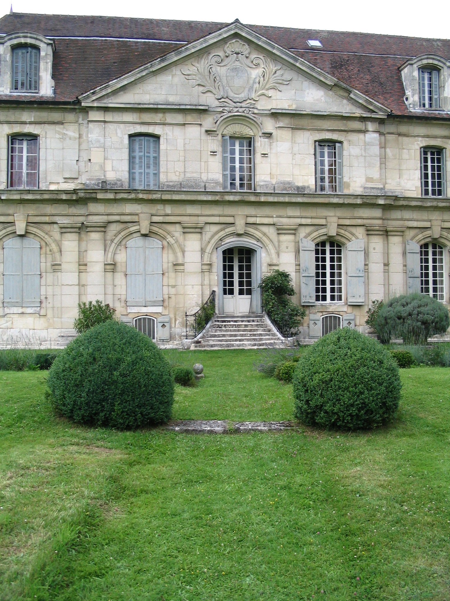 Chateau d'Ambleville, Val d'oise, France